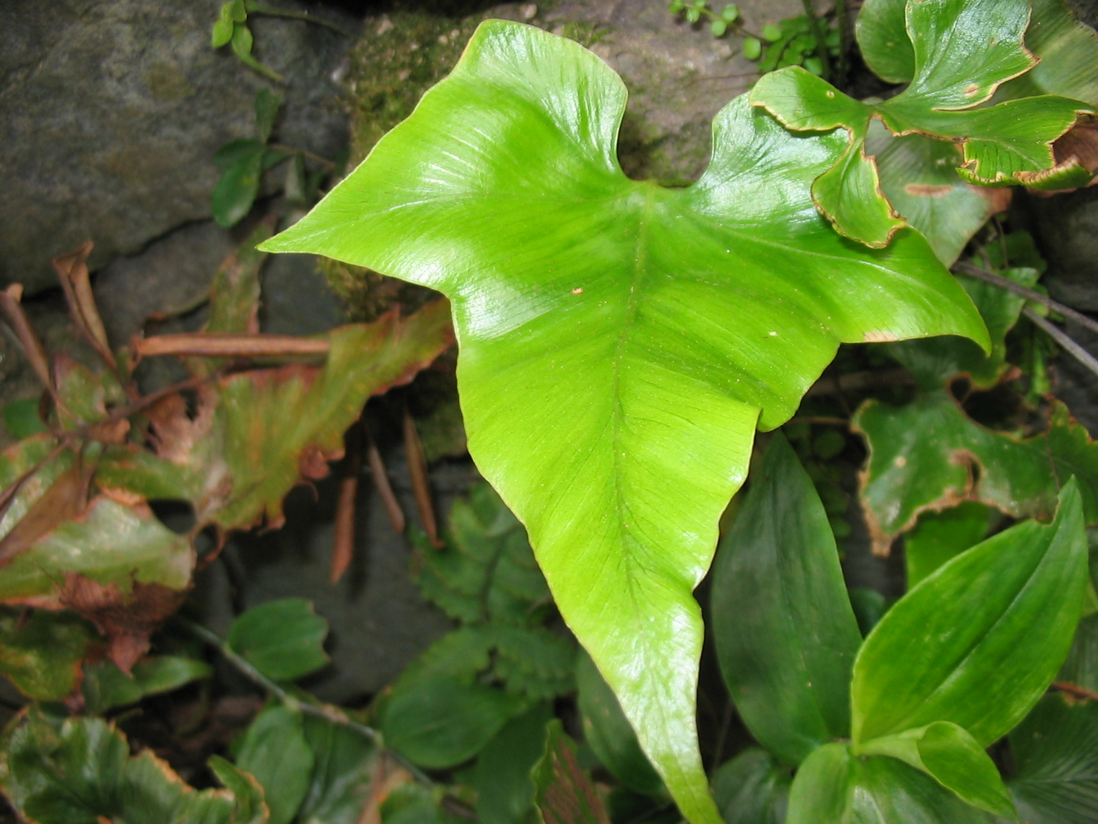 Asplenium hemionitis - Habitus